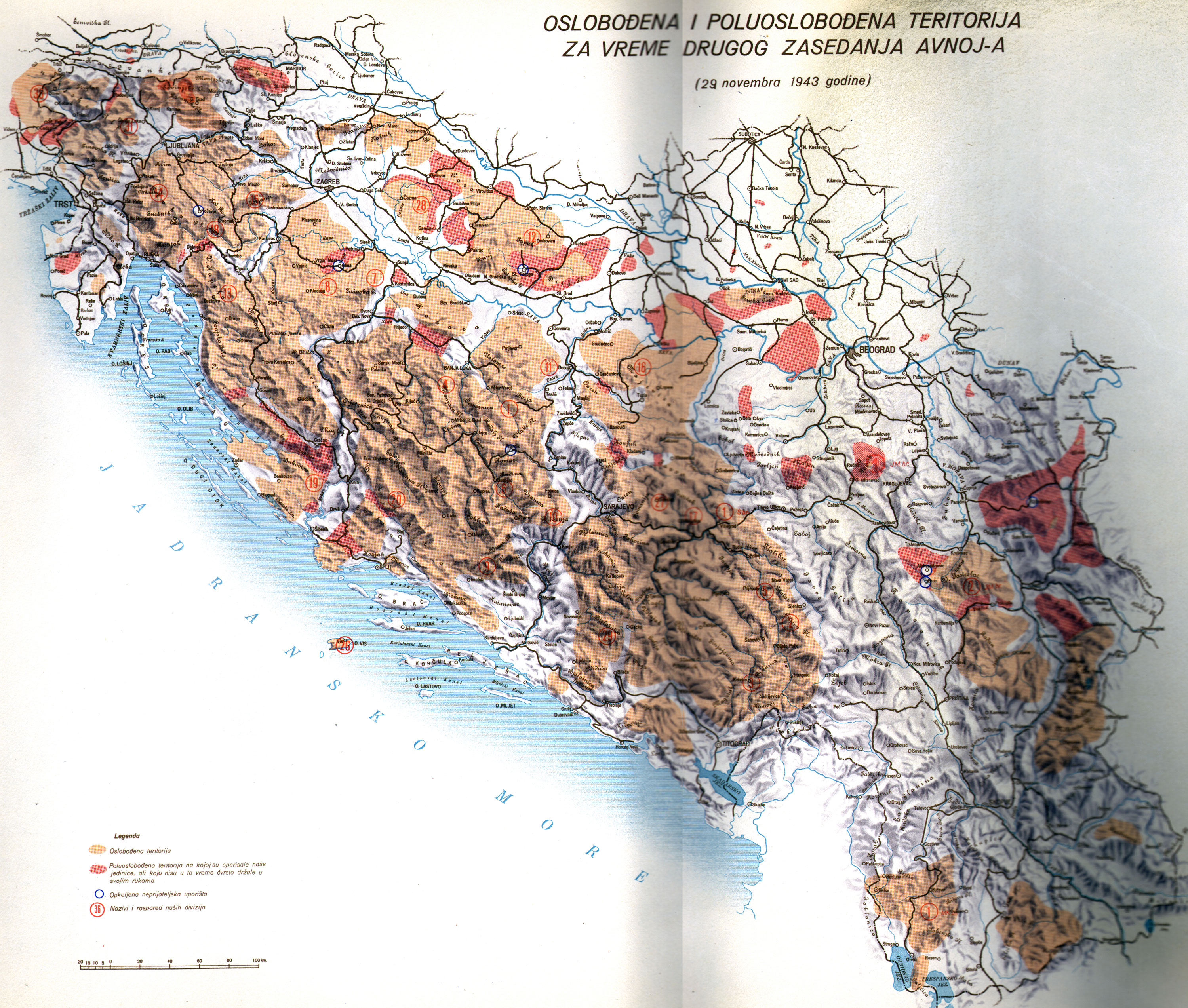 Srpskohrvatski / српскохрватски: Oslobođena i poluoslobođena teritorija za vreme Drugog zasedanja AVNOJ-a (29 novembra 1943 godine)